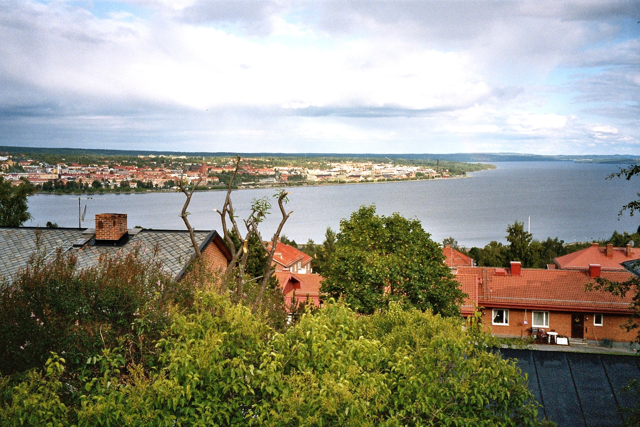 Bildbeskrivning: Yy från Frösön mot Östersund